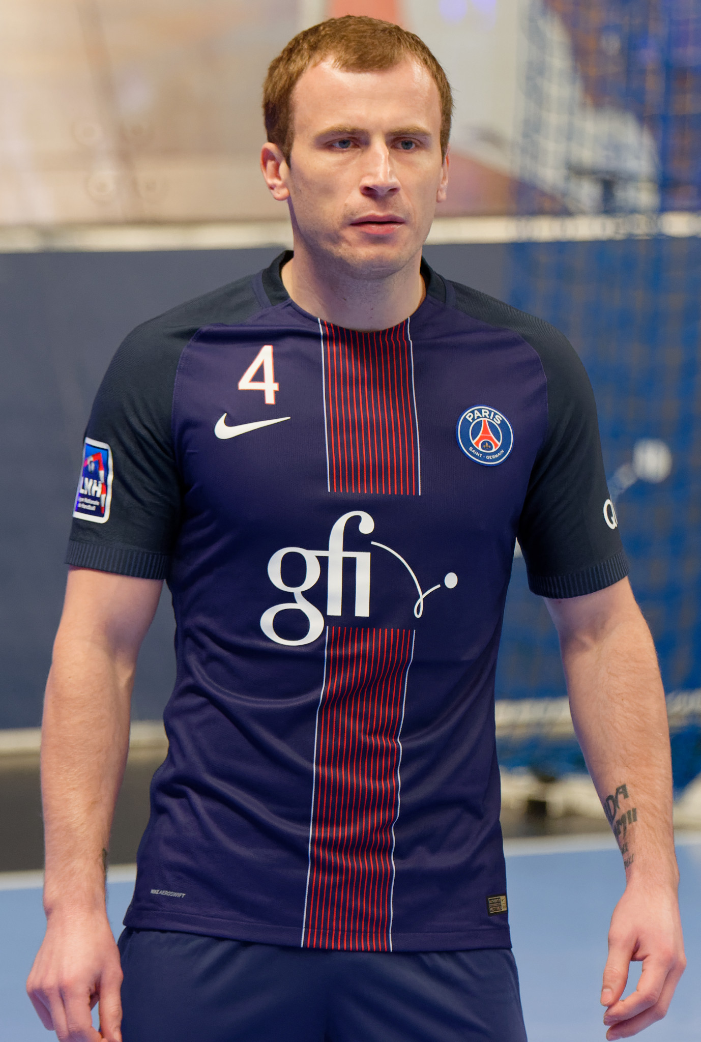 Rencontre de championnat entre le PSG et Pays d'Aix handball. A Coubertin, le 2 juin 2016.